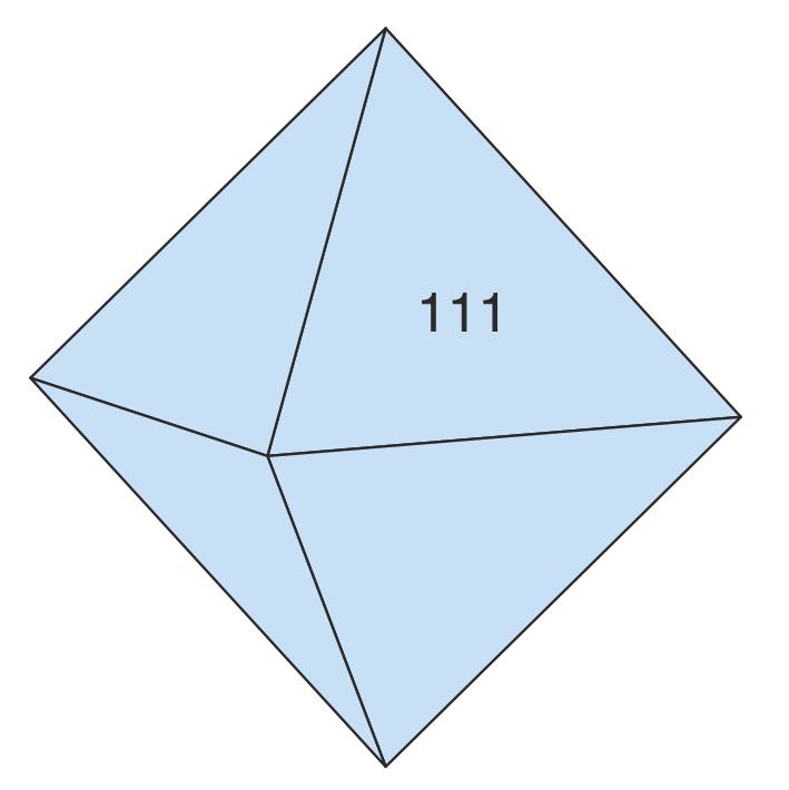 Zeichnung eines Hydroxykenomikrolith-Kristalls mit dem Oktaeder {111} als einziger Flächenform